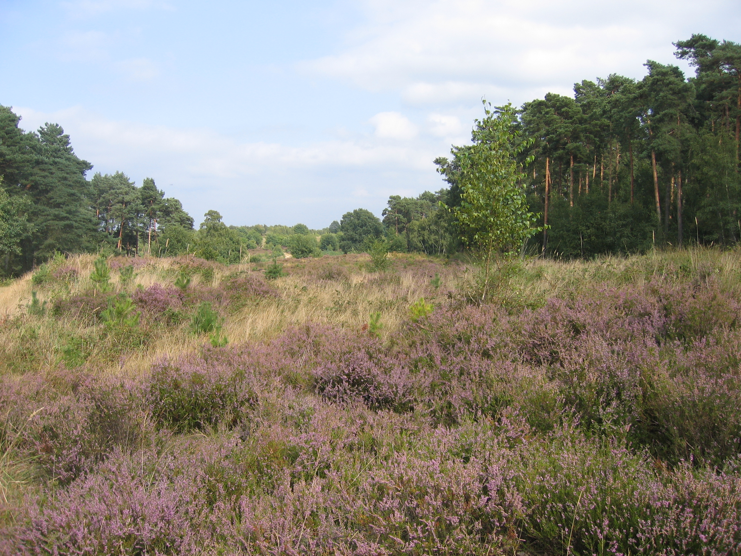 Wahner Heide während der Heideblüte Ende August